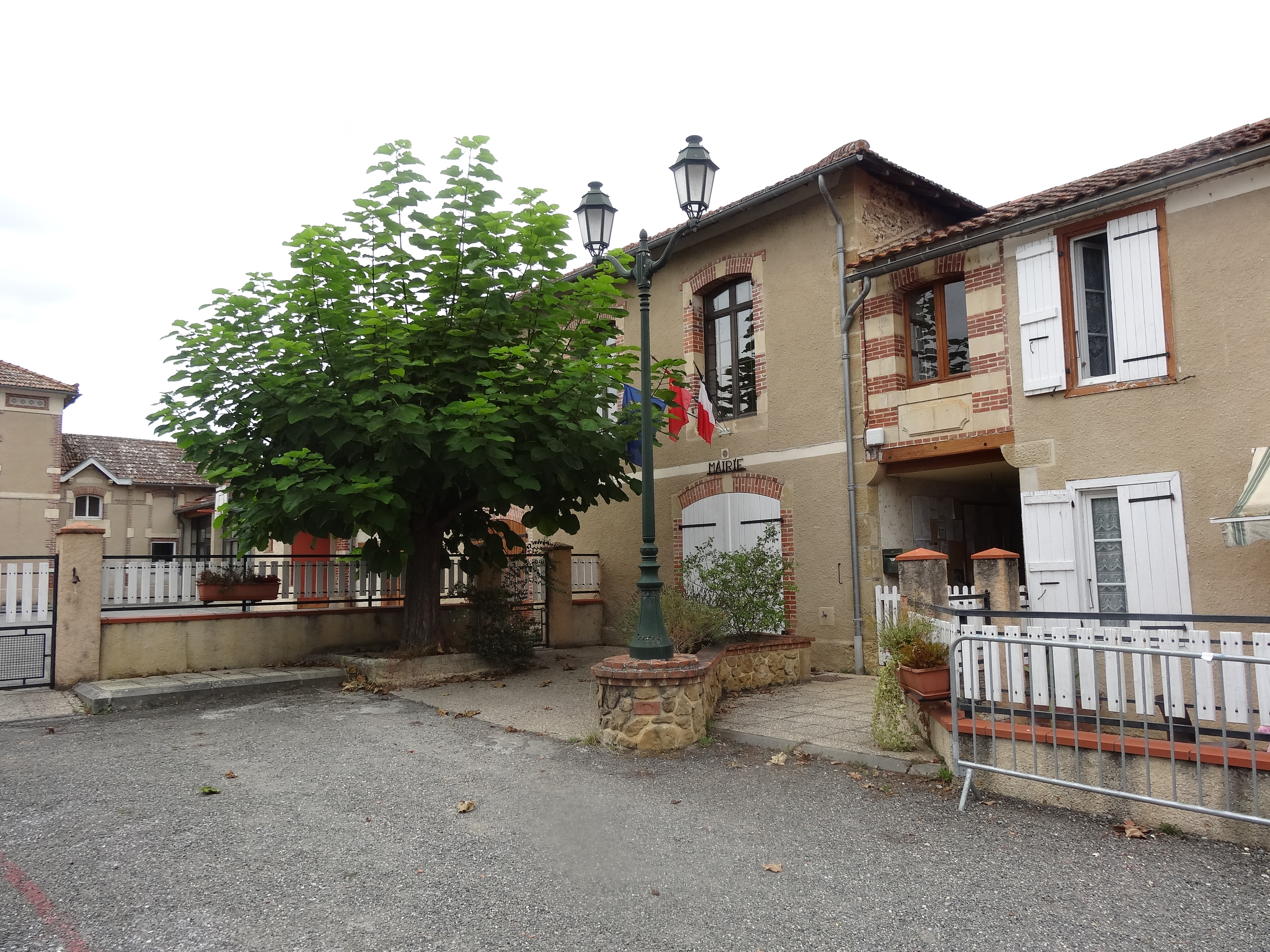 Mairie de Saint-Michel dans le Gers.